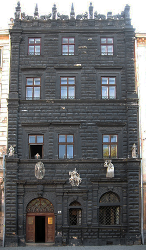 Black Kamienica